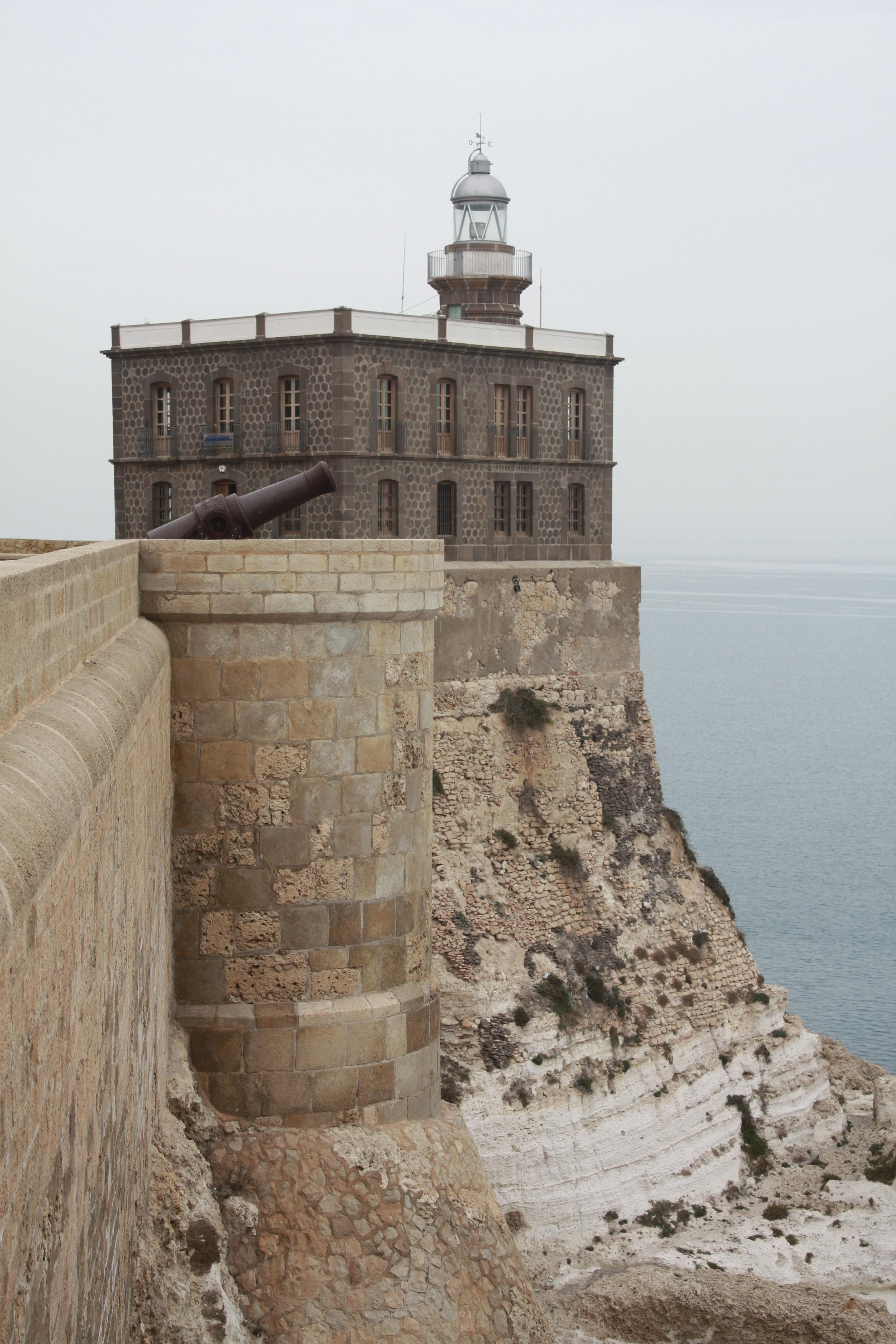 Faro de Melilla en el torreón del Bonete y cañón en el torreón del Bonete Chico